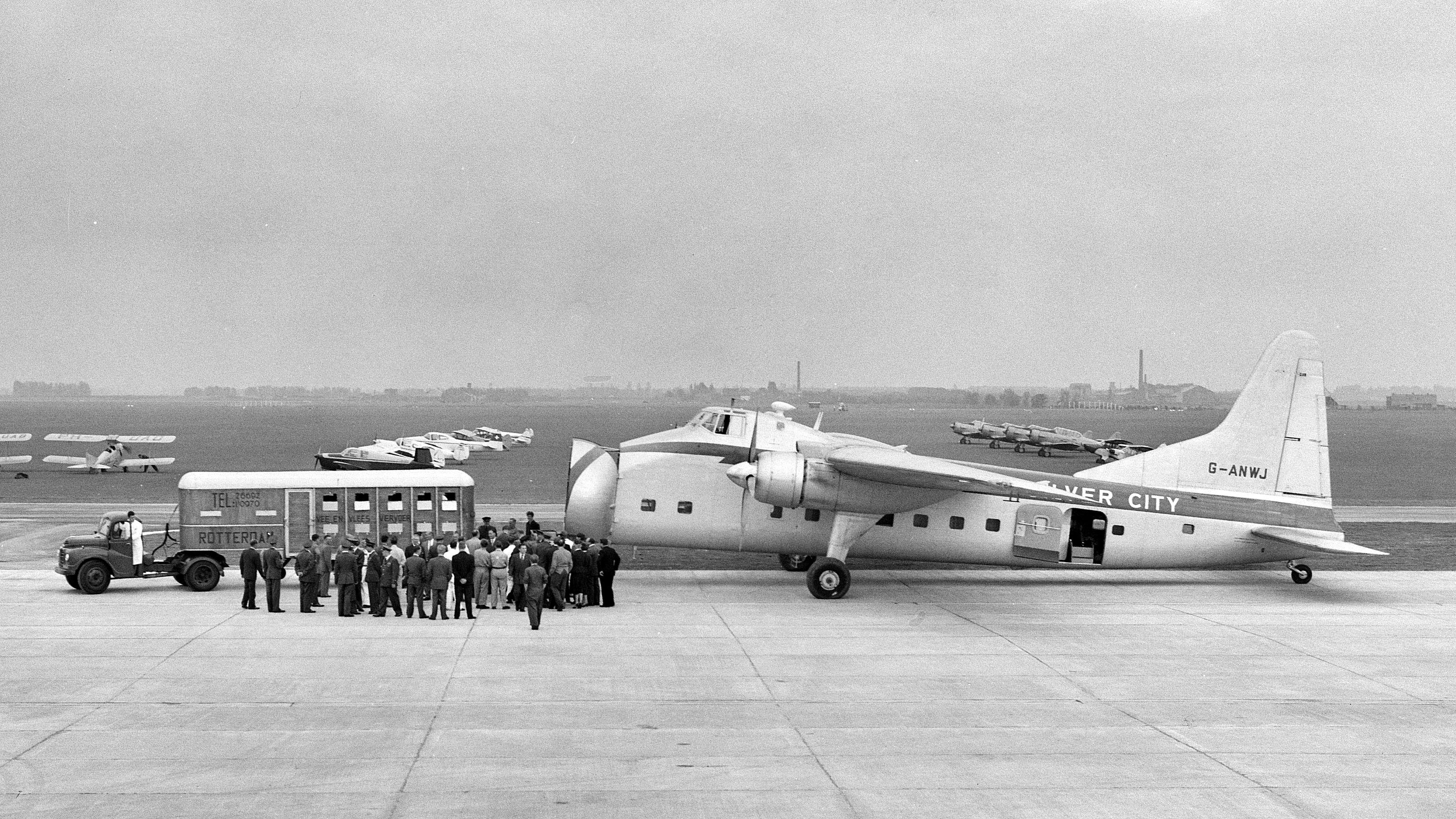 Collectie / Archief : Fotocollectie Anefo Reportage / Serie : [ onbekend ] Beschrijving : Officiele ingebruikneming Rotterdams vliegveld Zestienhoven Datum : 1 oktober 1956 Locatie : Rotterdam, Zuid-Holland Trefwoorden : Ingebruiknemingen, vliegvelden Instellingsnaam : Zestienhoven Fotograaf : Bilsen, Joop van / Anefo Auteursrechthebbende : Nationaal Archief Materiaalsoort : Negatief (zwart/wit) Nummer archiefinventaris : bekijk toegang 2.24.01.04 Bestanddeelnummer : 908-0381